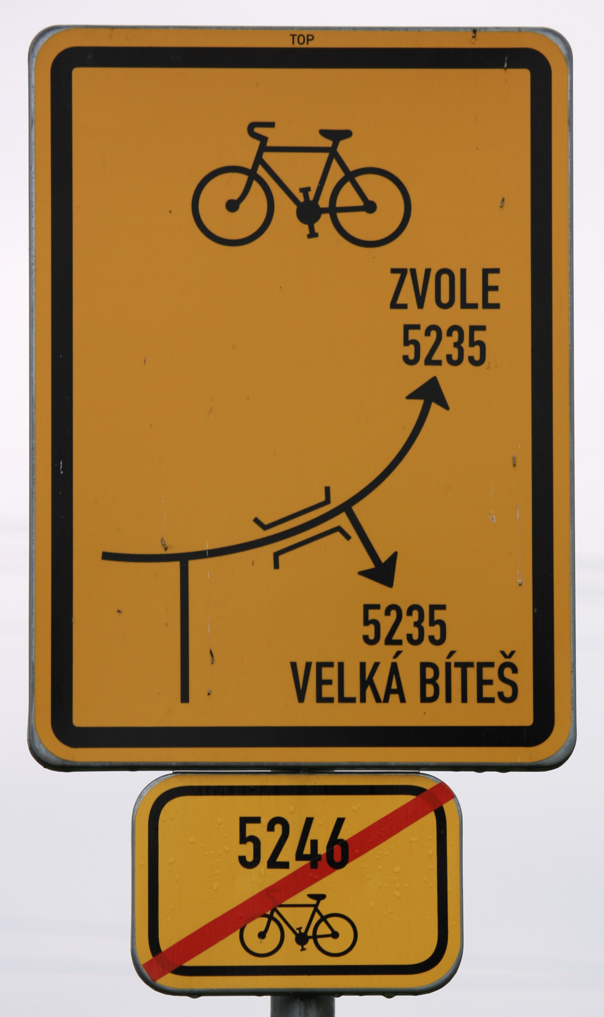 Strážek - značení cyklotras This photograph was taken within the scope of the 'Czech Municipalities Photographs' grant. This photograph was taken with a DSLR from WMCZ's Camera grant.